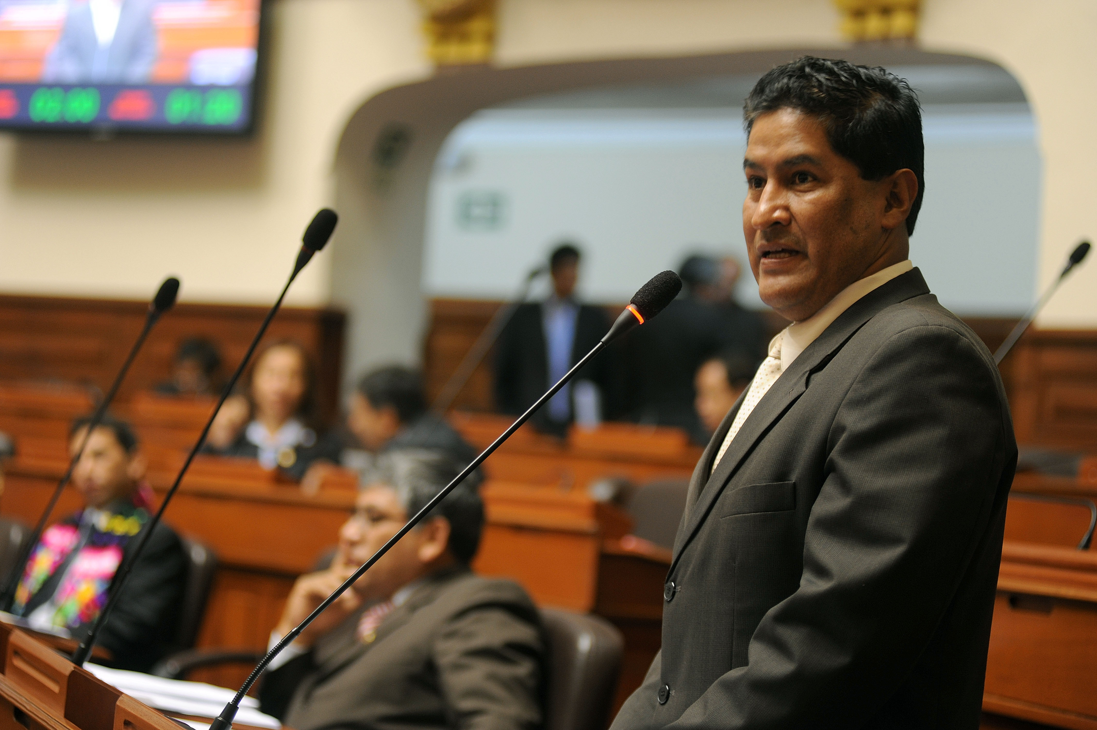 El legislador Oswaldo Luizar fija su posición en el debate parlamentario realizado esta tarde por el Pleno.